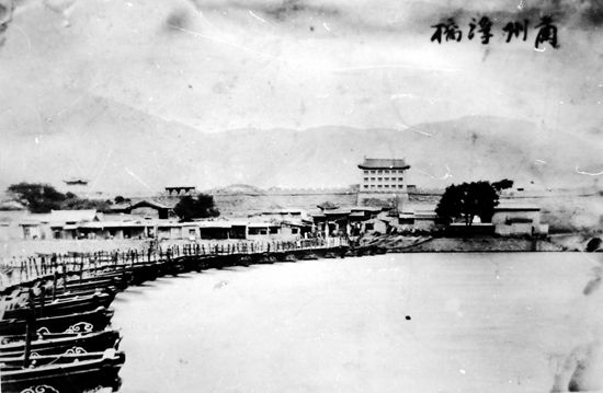 1907年拍摄的兰州黄河镇远浮桥及桥门（通济门）